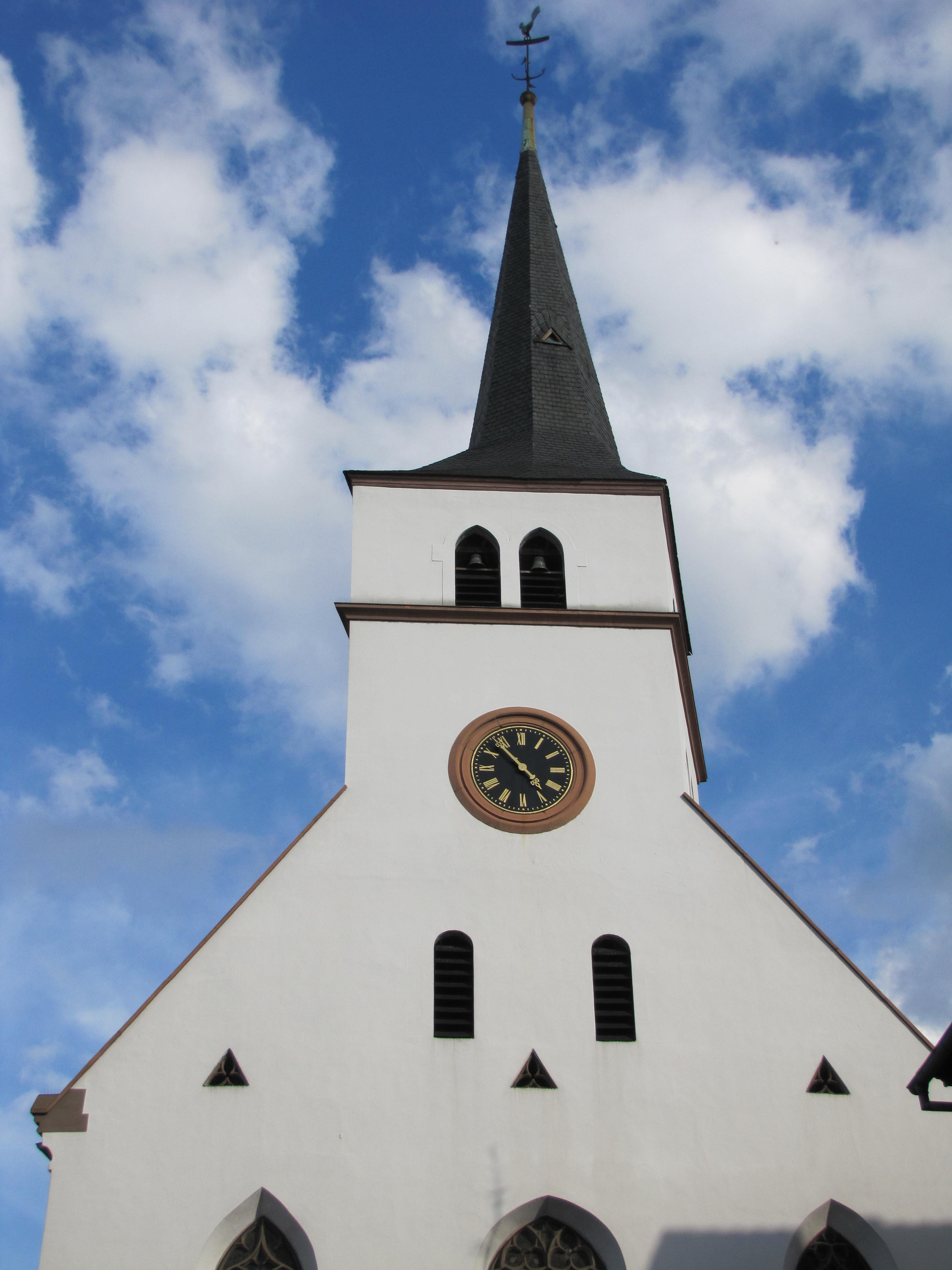 Alsace, Bas-Rhin, Église protestante Saint-Guillaume de Strasbourg (PA00085026).